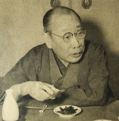 久保田万太郎